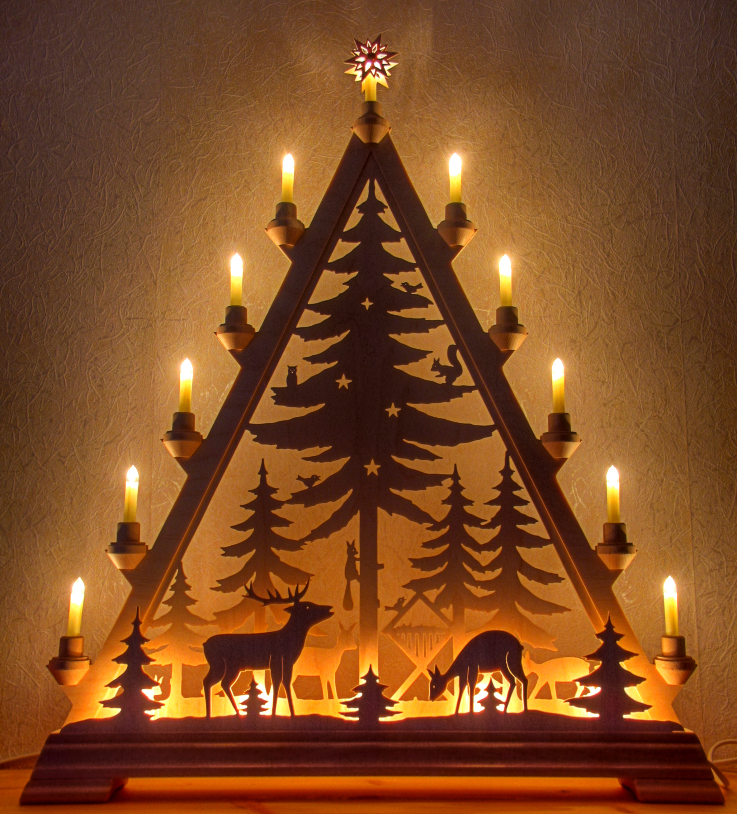 Deutsche Weihnachtstradition, moderner Schwibbogen aus dem Erzgebirge (Oberwiesenthal)